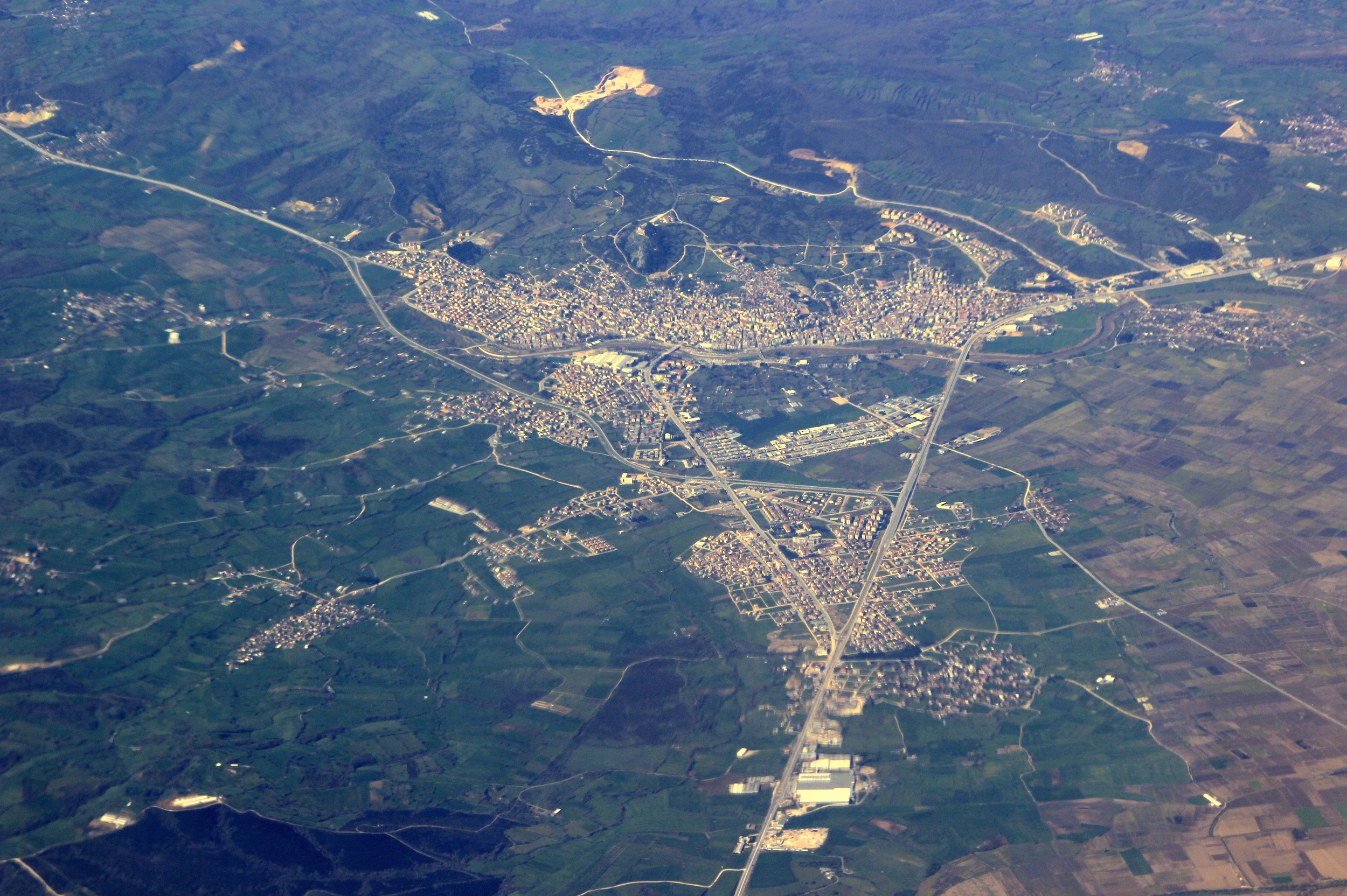 Luftaufnahme der Stadt Biga in der Türkei.